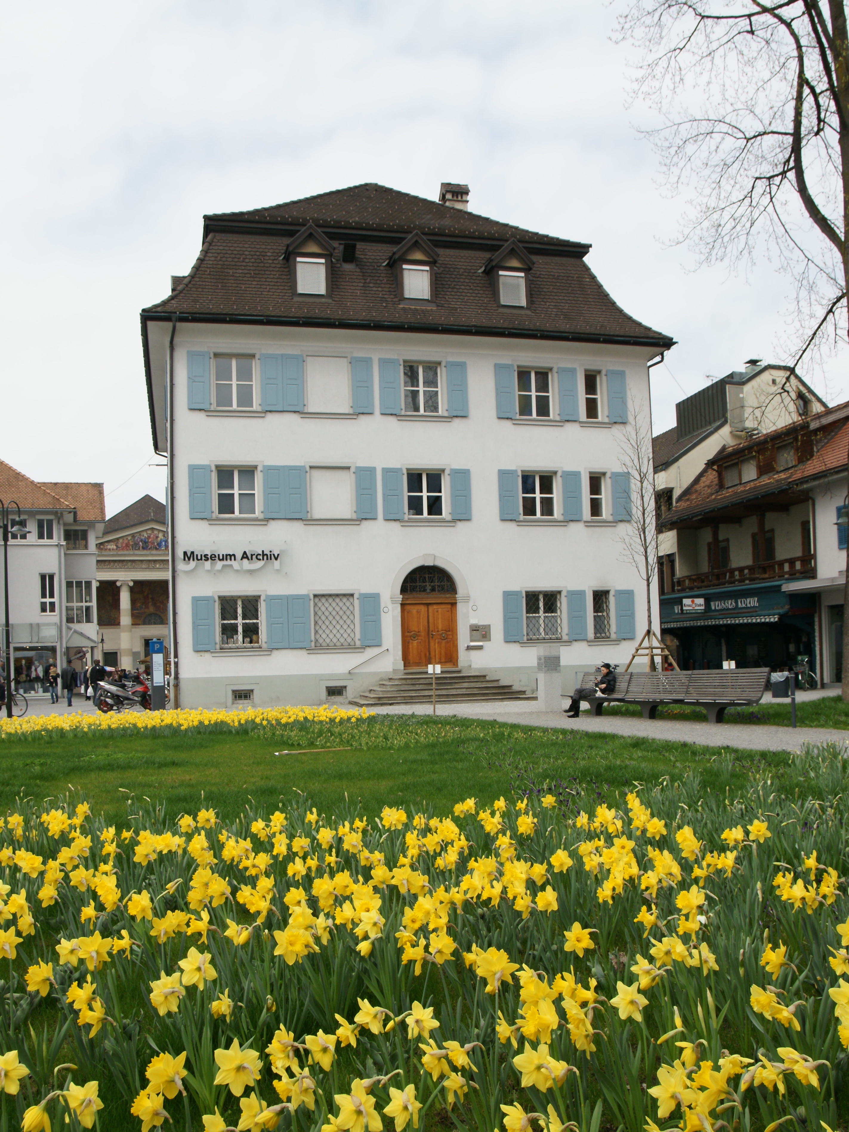 aus dem DEHIO Vorarlberg 1983: (Dornbirn ) Marktplatz Nr.11: Sogenanntes "Lorenz-Rhomberg-Haus", erbaut 1796; kubischer Baukörper, 3geschossig, allseitig 5achsig, Mansardwalmdach; erhöhter Eingang mit mittelachsigem Flur, sandsteingerahmtes Portal bezeichnet 1796, originales Lunettengitter, Türflügel; ebenerdig Klostergitter in den Fenstern. Heute Museum und Archiv der Stadt Dornbirn